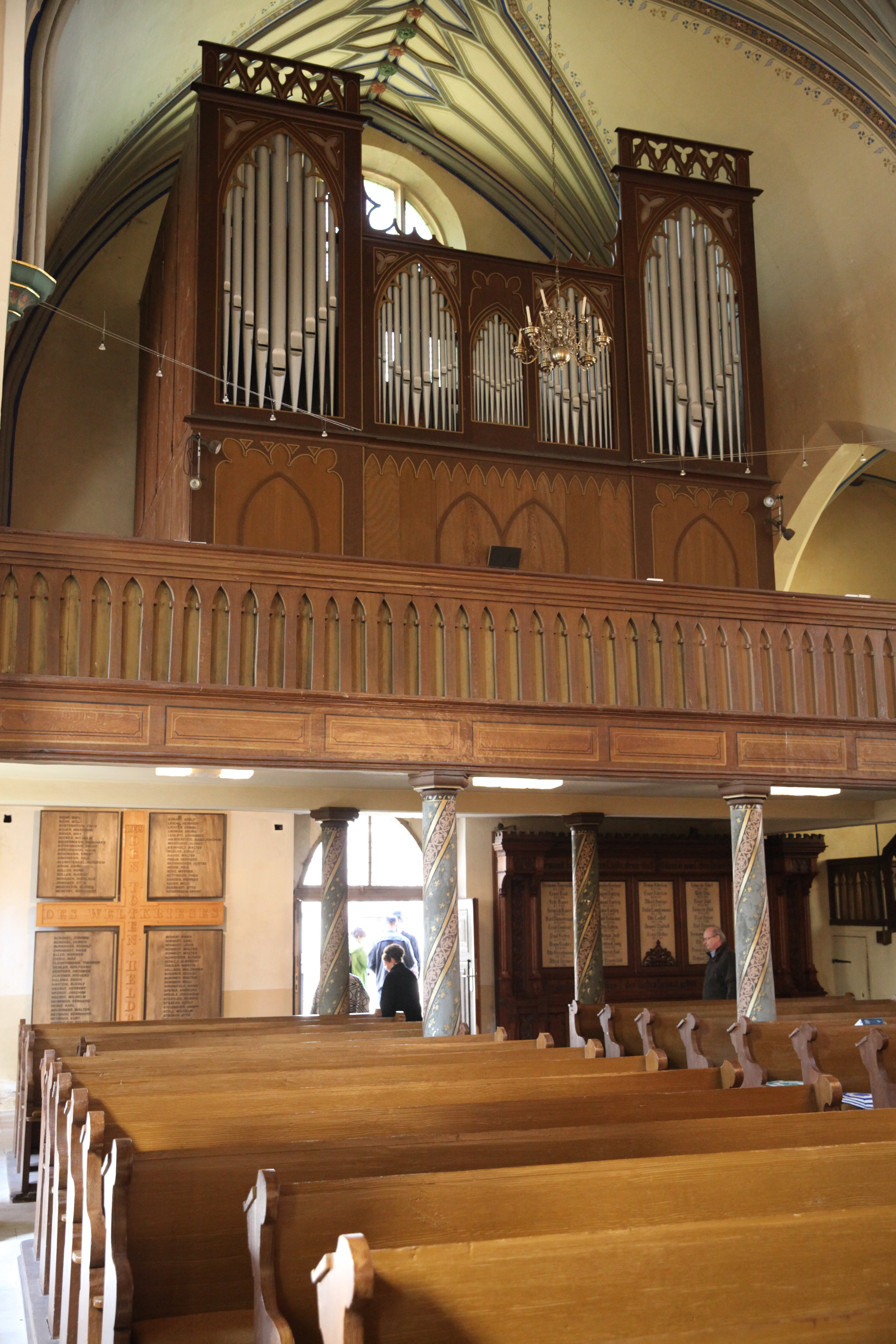 Orgel, Evangelische Stadtkirche Unserer lieben Frauen, Heldburg